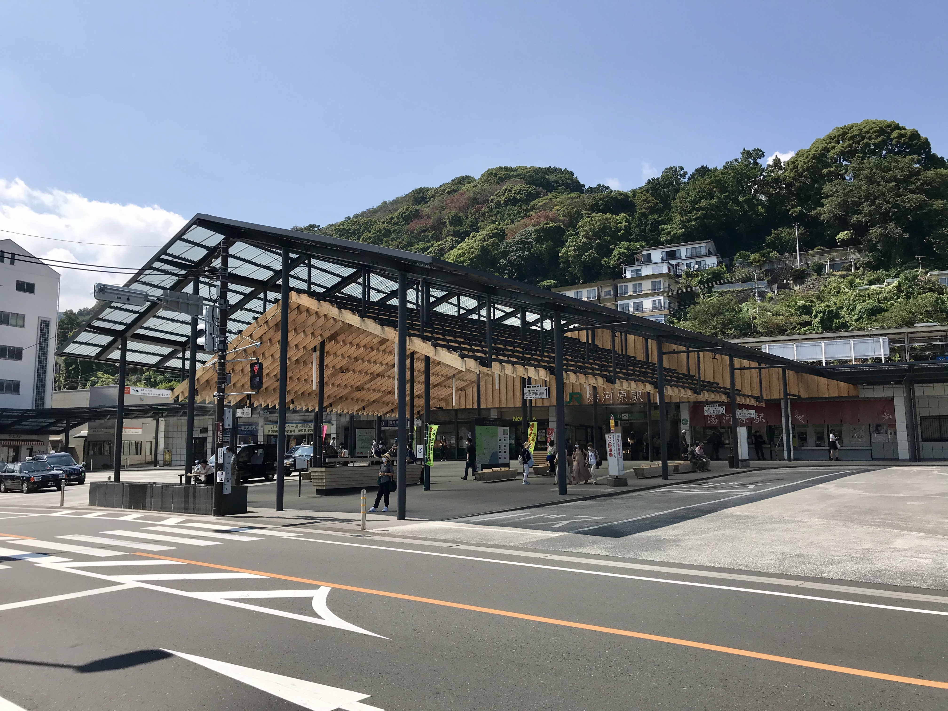 JR東日本東海道線湯河原駅リニューアル後の駅舎